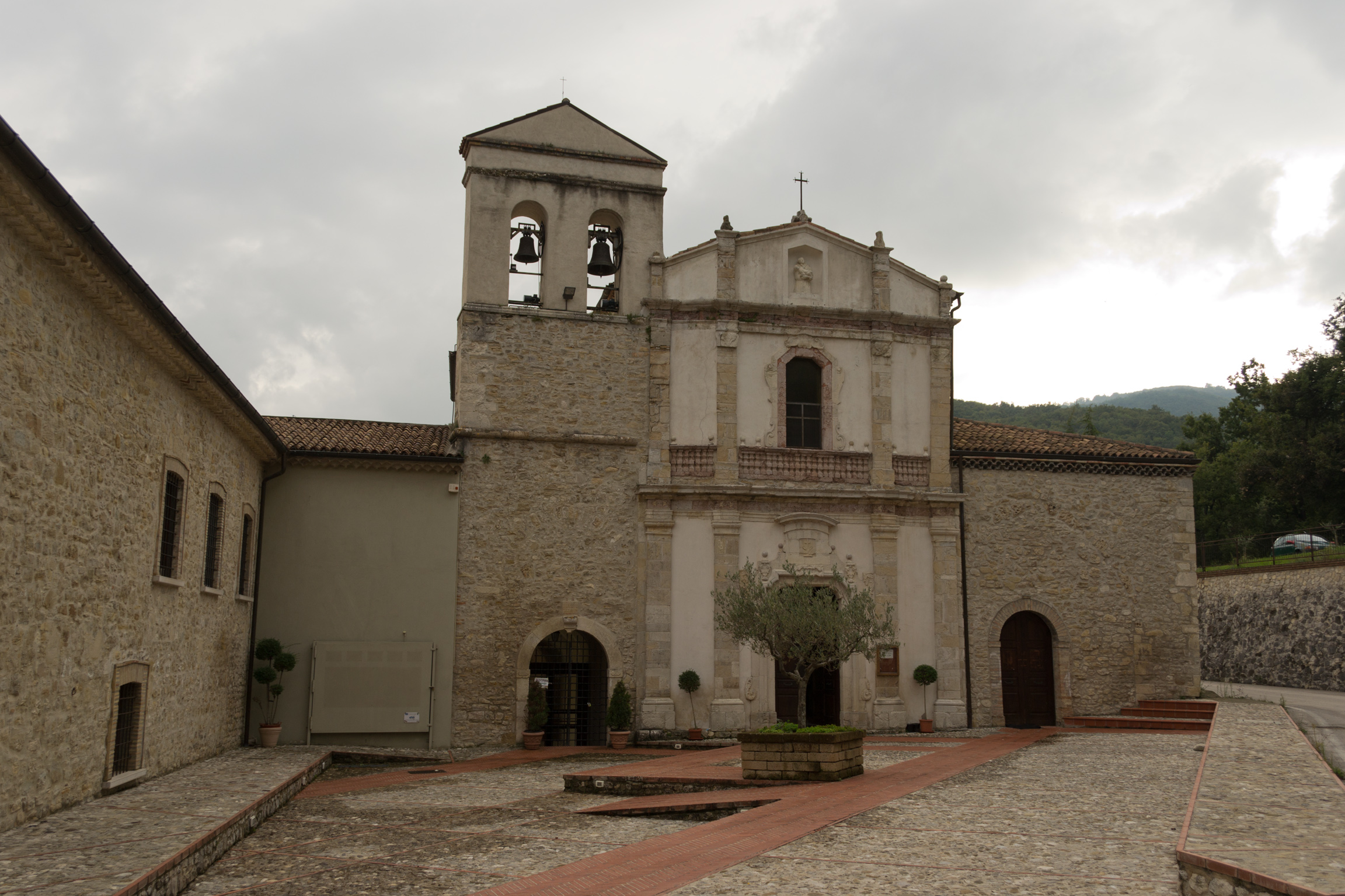 Facciata del convento di Sant'Antonio